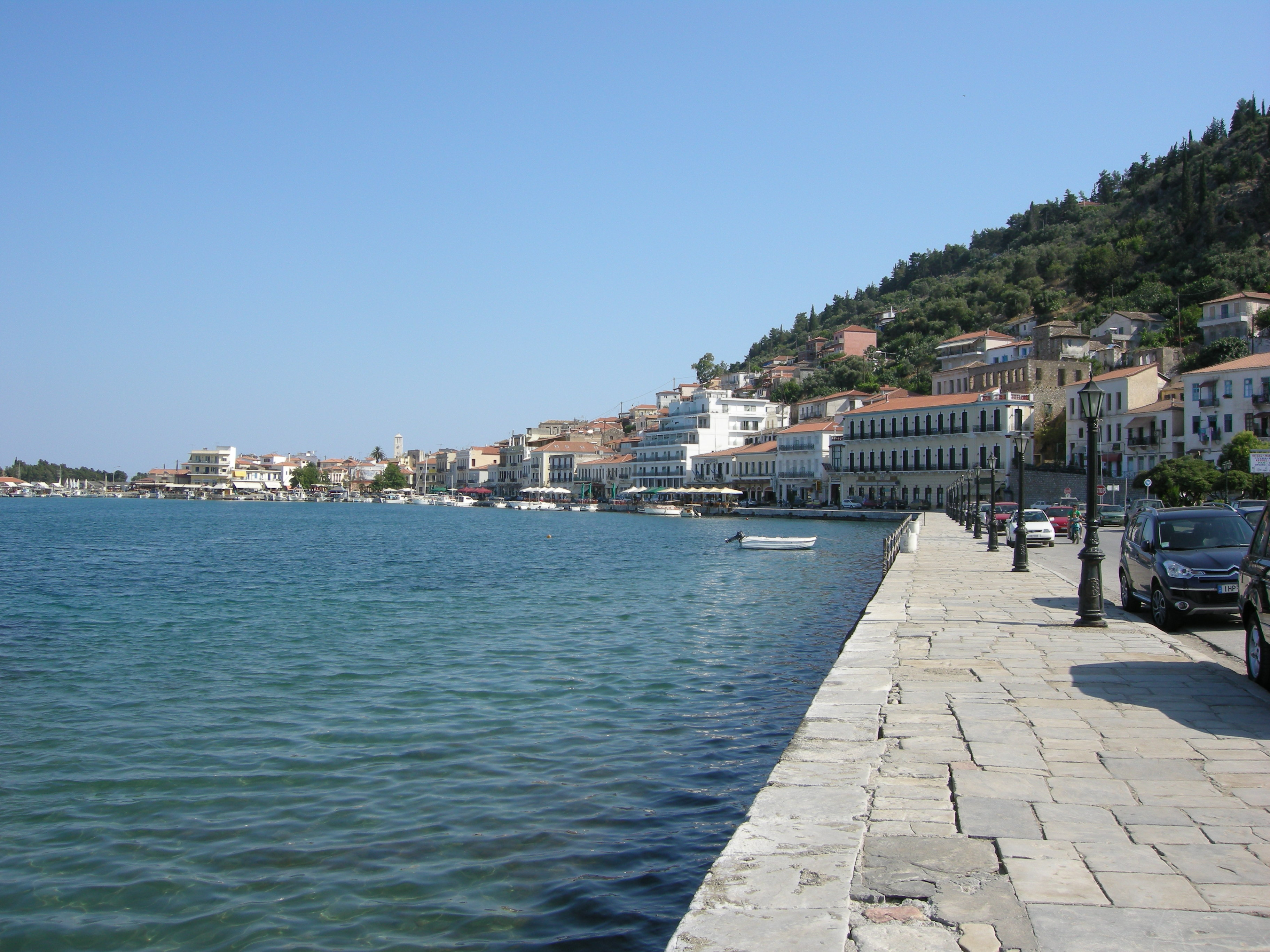 Gythios